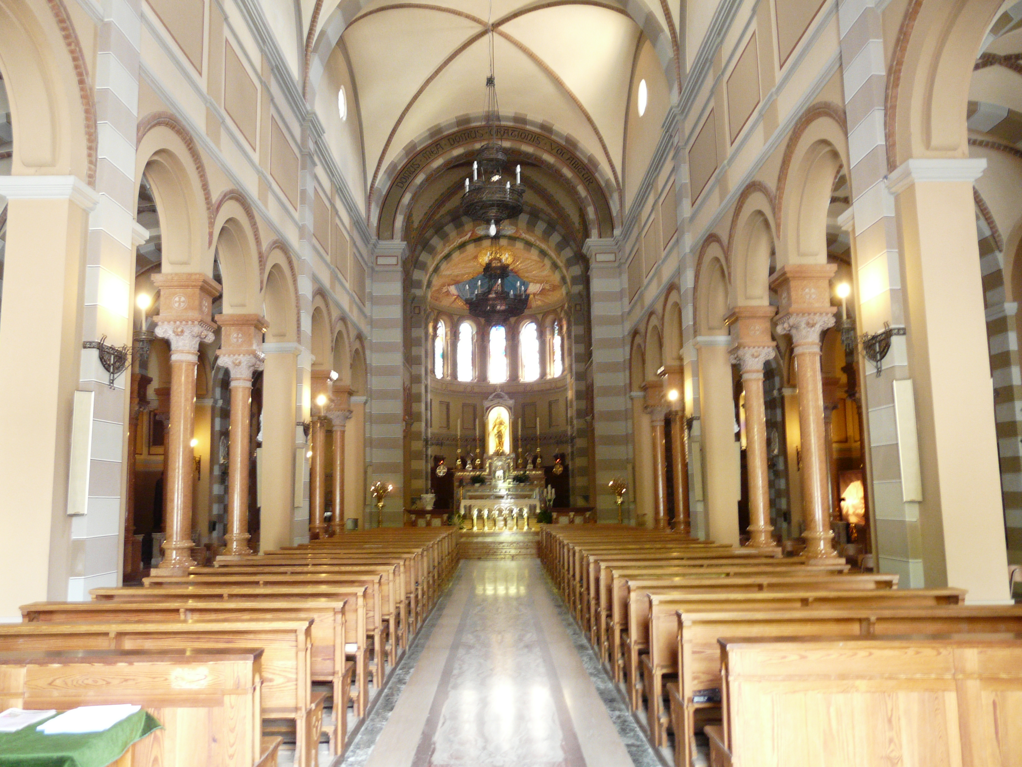 Chiesa di Santa Maria Addolorata di Bardi, Emilia-Romagna, Italia